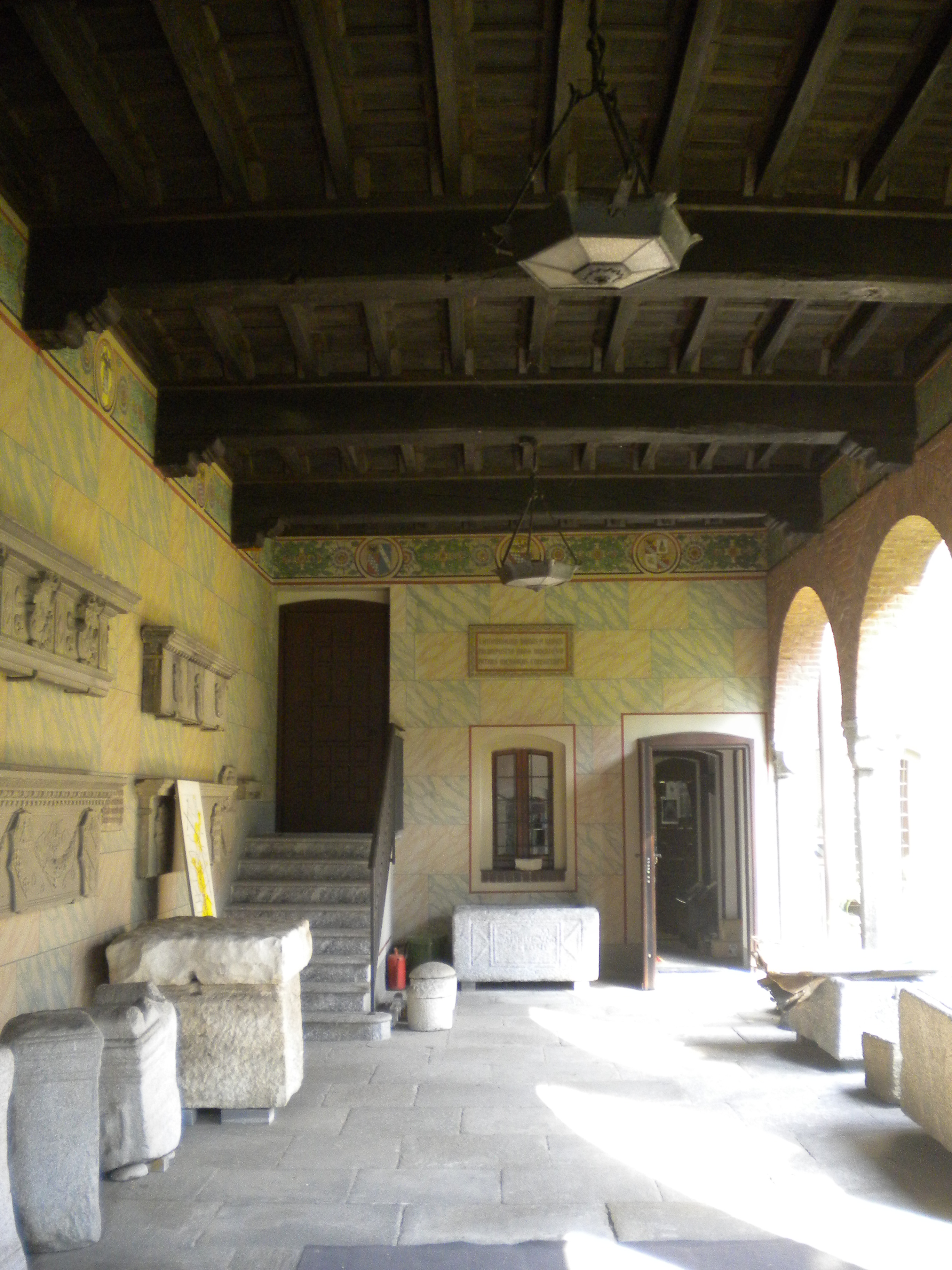 Museo Civico "Guido Sutermeister" This is a photo of a monument which is part of cultural heritage of Italy.